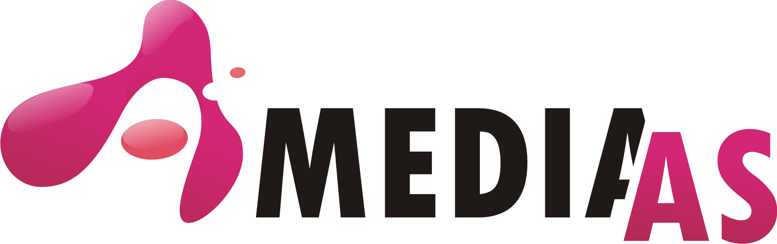 Logo For A-Media AS, eier av Radio Haugaland